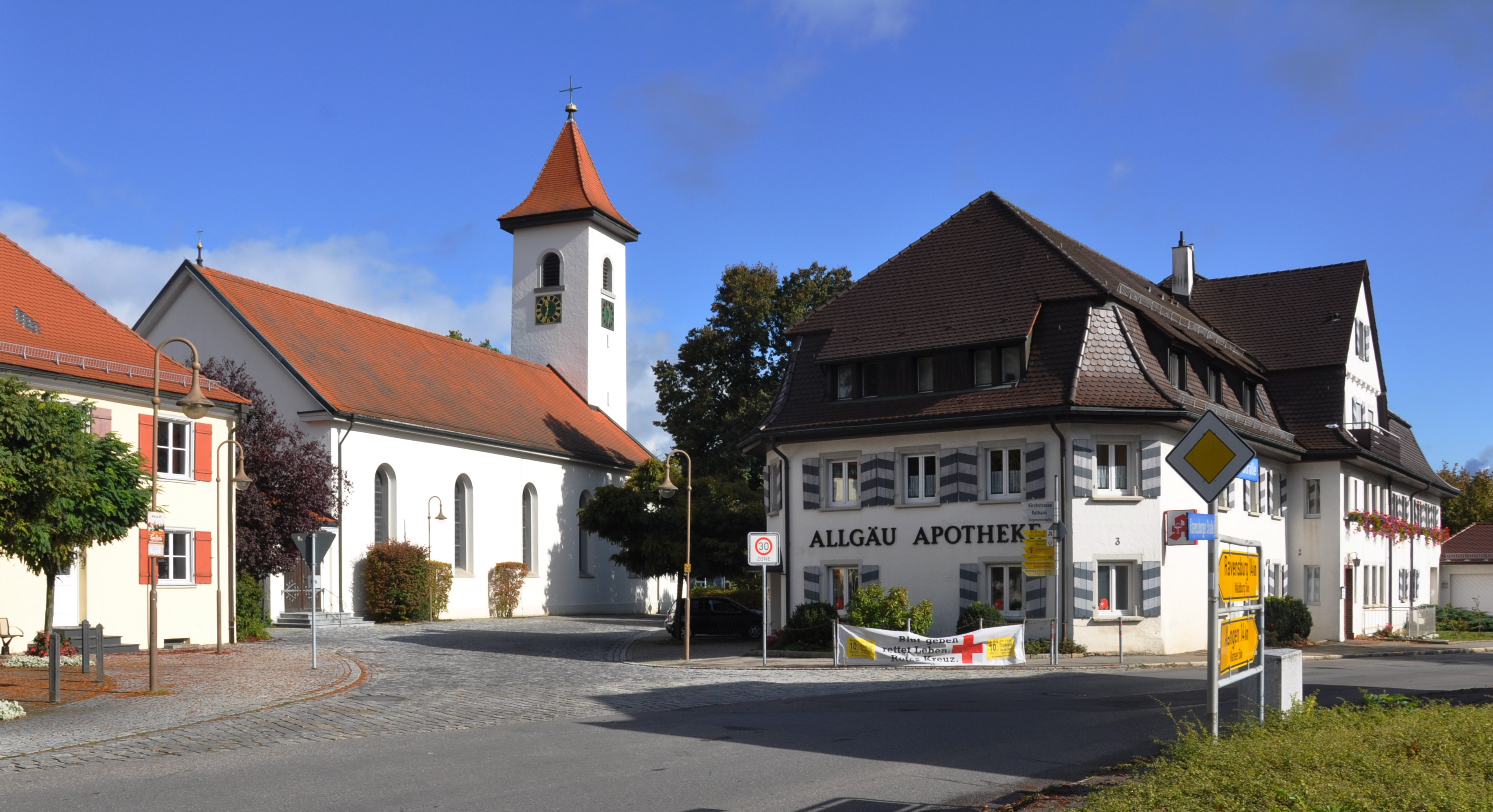 Vogt, Landkreis Ravensburg, Katholische Pfarrkirche und Allgäu-Apotheke